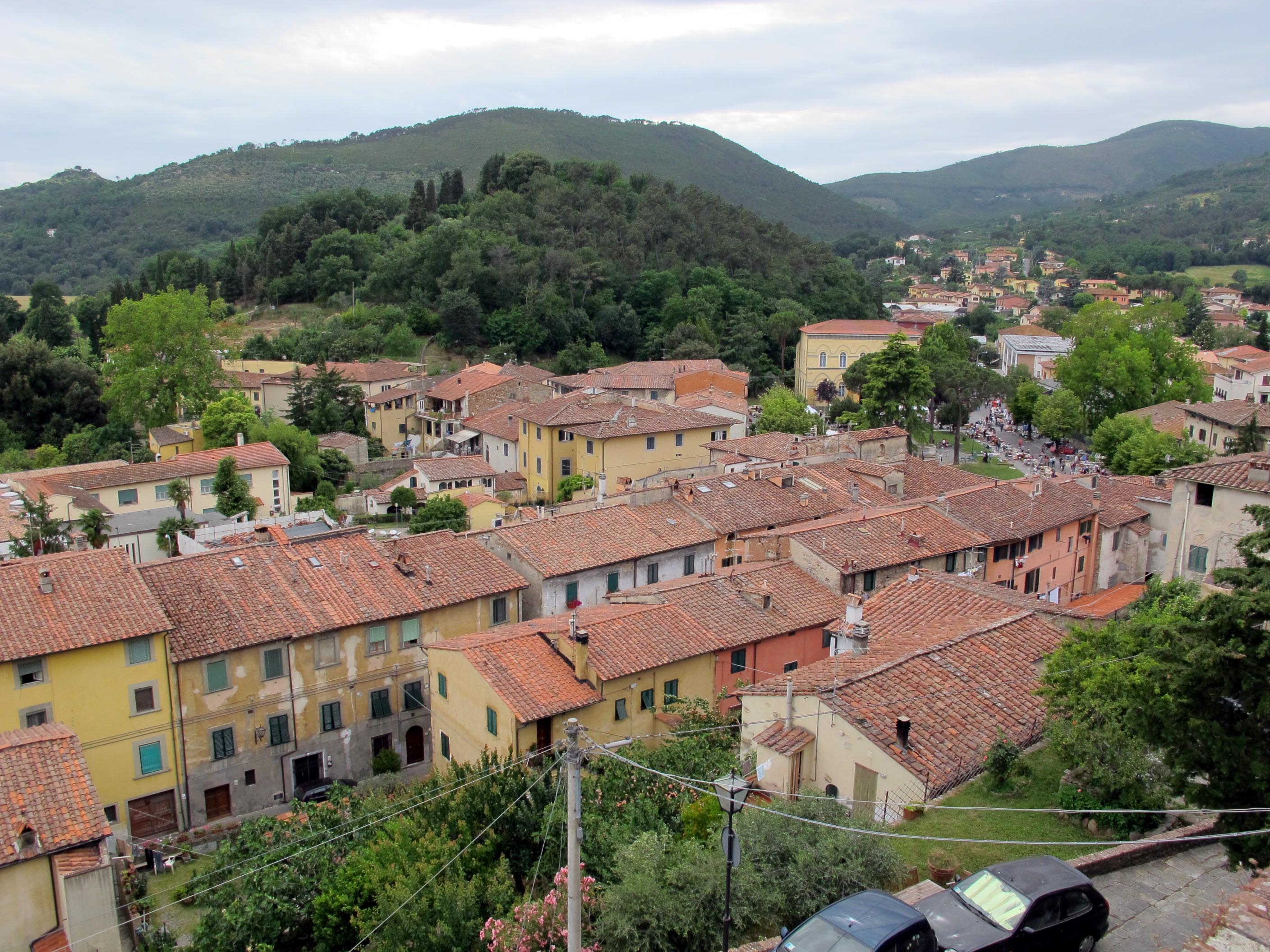 Vicopisano, veduta